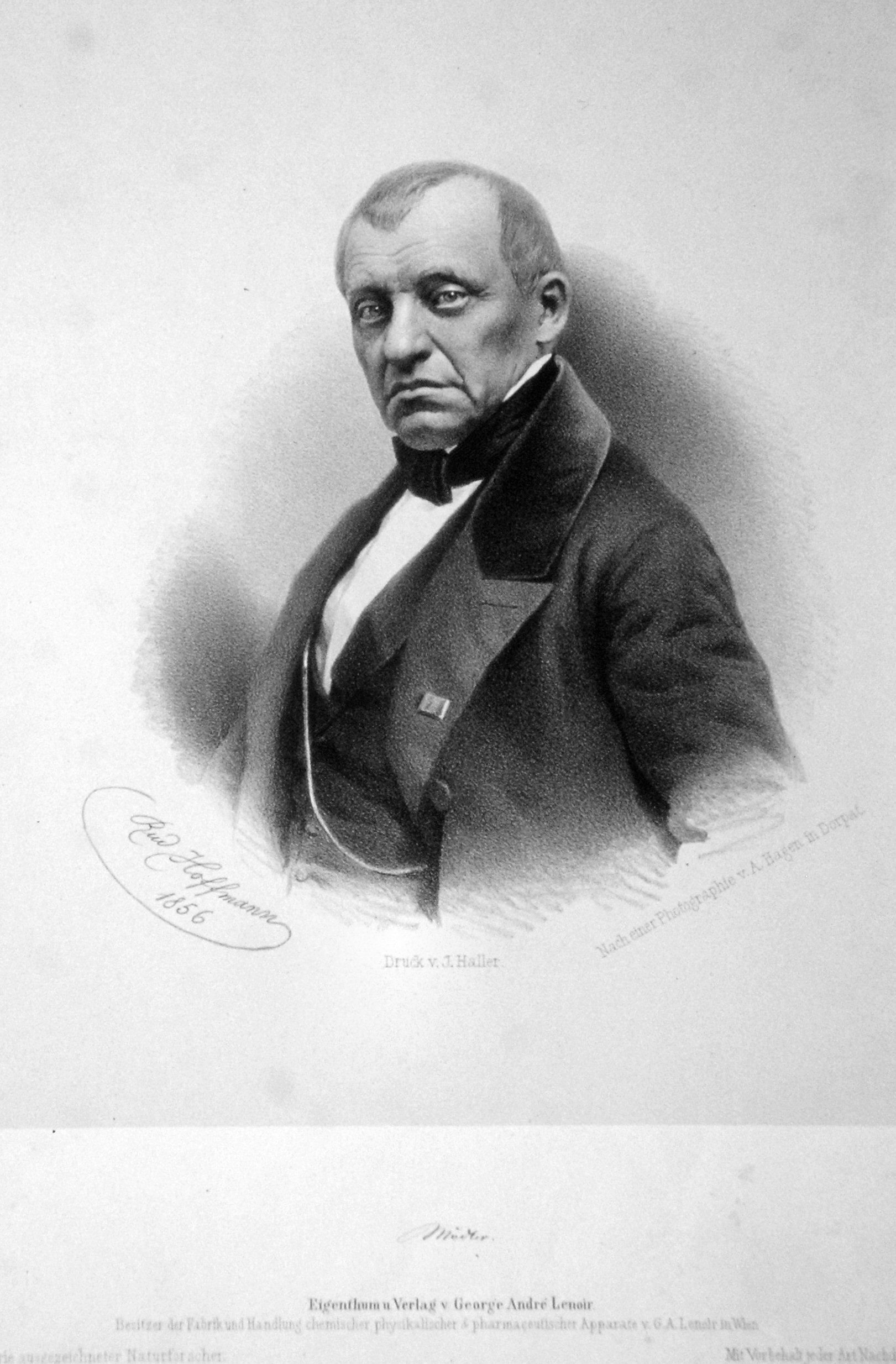 Johann Heinrich Mädler, Lithographie von Rudolf Hoffmann, 1856. Nach einer Fotografie von A. Hagen in Dorpat.